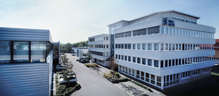 teamtechnik Firmensitz in Freiberg am Neckar